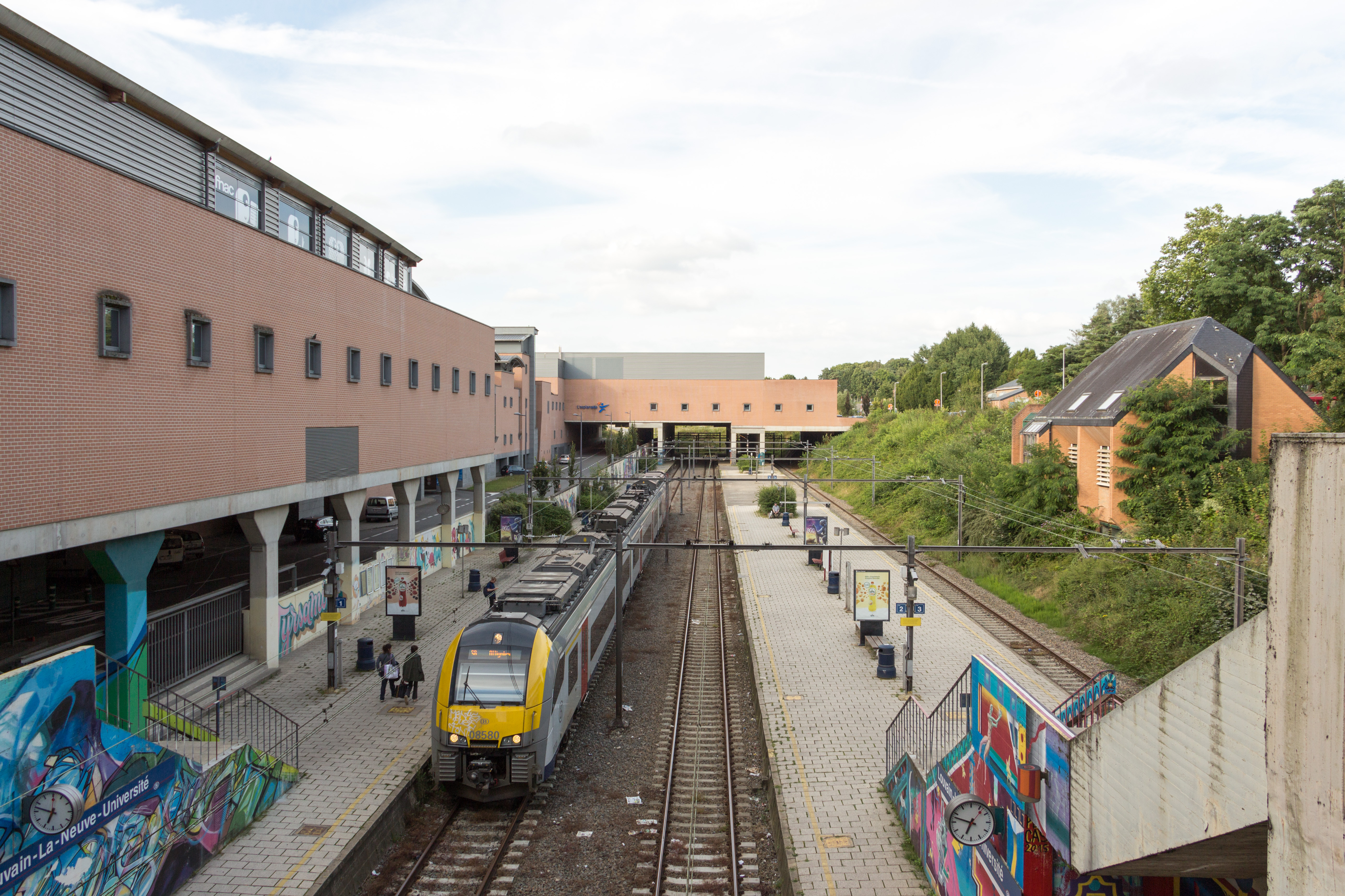 Vue de la gare de Louvain-la-Neuve-Université avec une automotrice Siemens Desiro ML